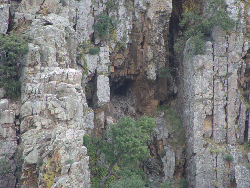 Nido de Ciconia nigra (cigüeña negra)